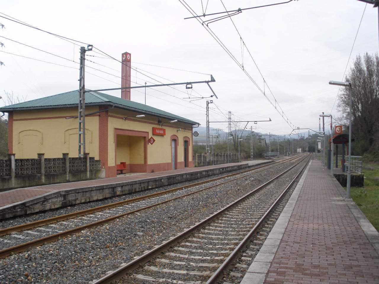 Riaño de Langreo (Asturias)